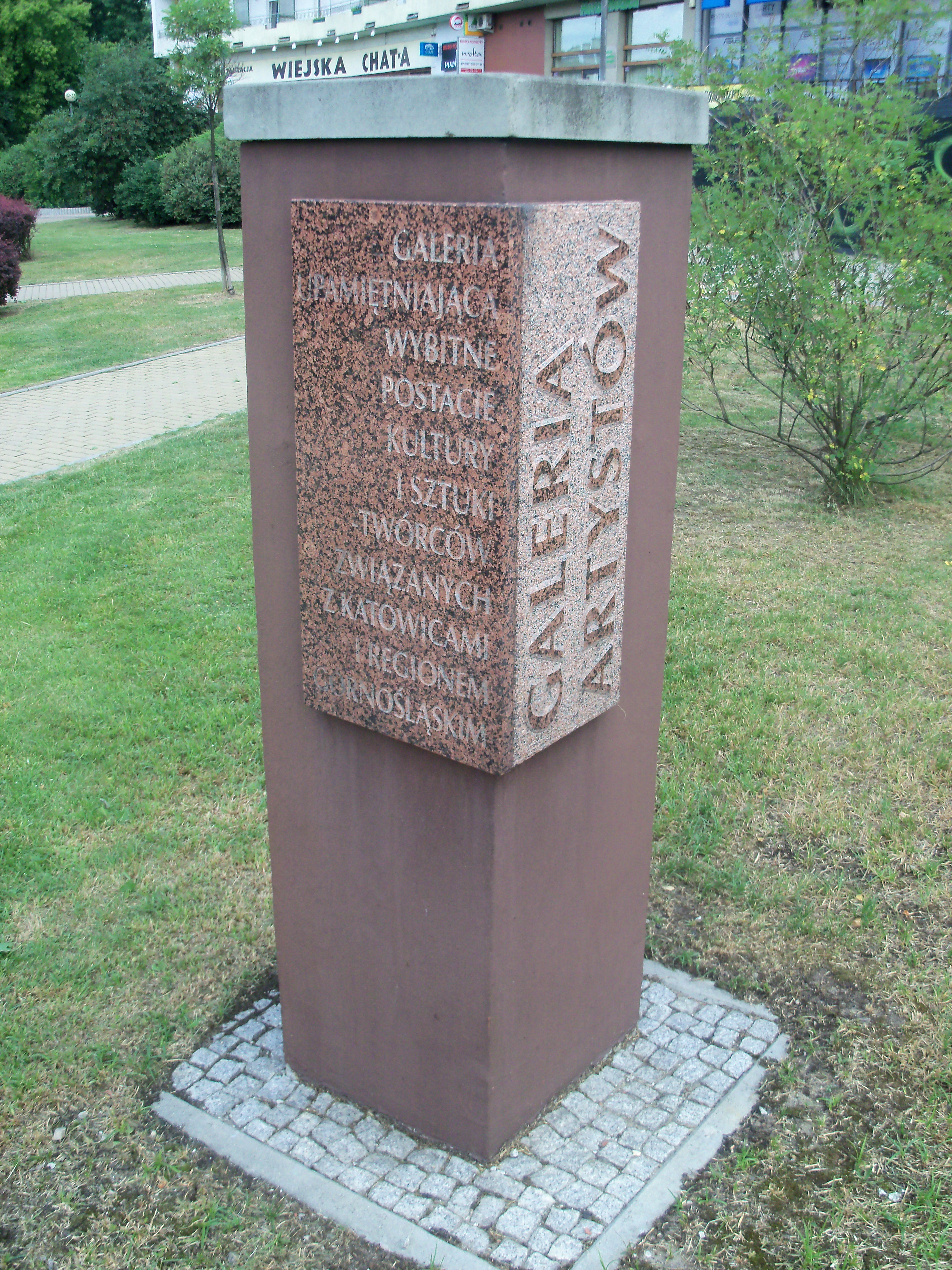 Galeria Artystyczna na placu Grunwaldzkim w Katowicach